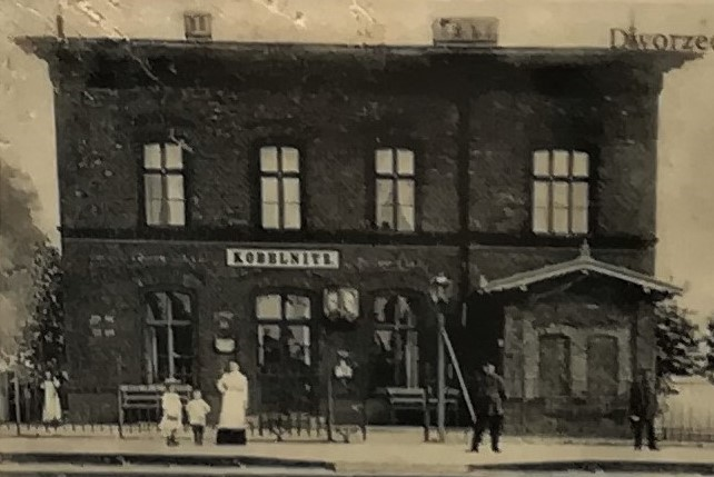 Dworzec w Kobylnicy koło Poznania około 1910 r.